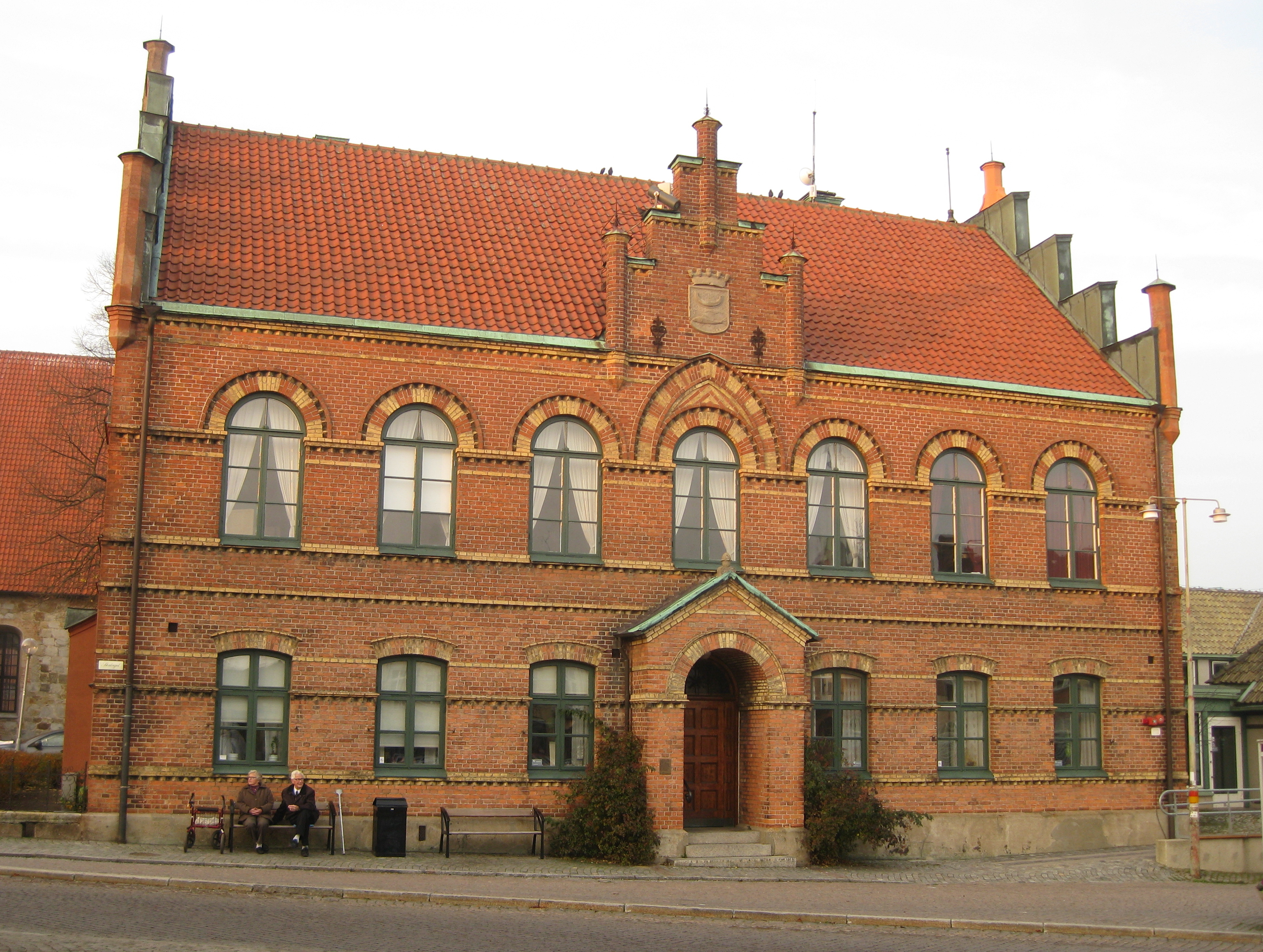 Gamla rådhuset i Simrishamn